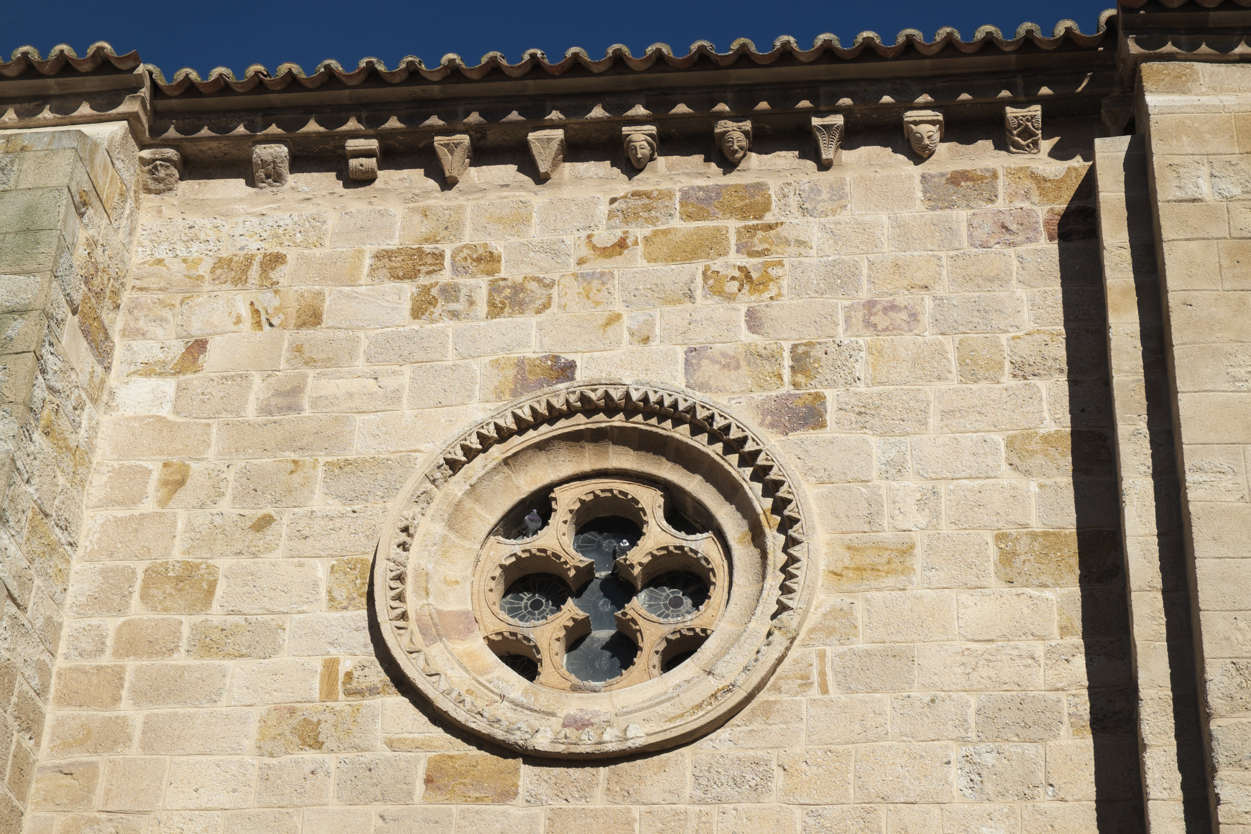 Kirche Santa María Magdalena in Zamora (Kastilien-León/Spanien), Rosette und Kragsteine